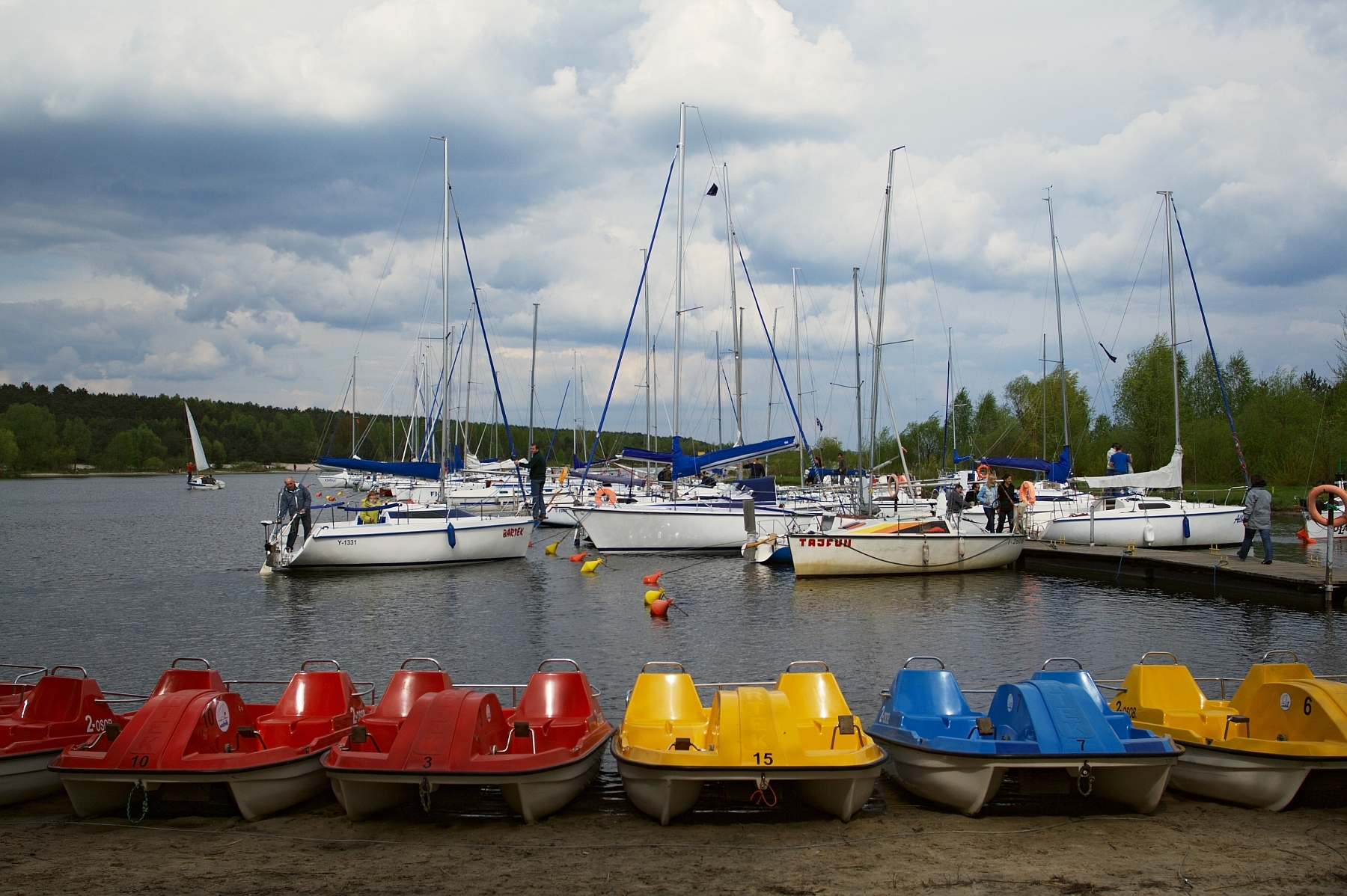 Zalew Sulejowski